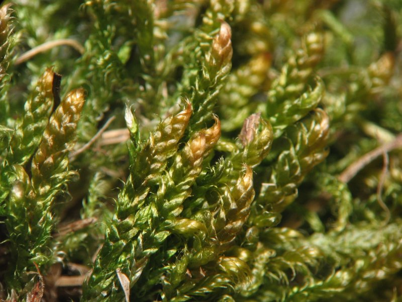 Geschwollenes Zypressen-Schlafmoos (Hypnum lacunosum)